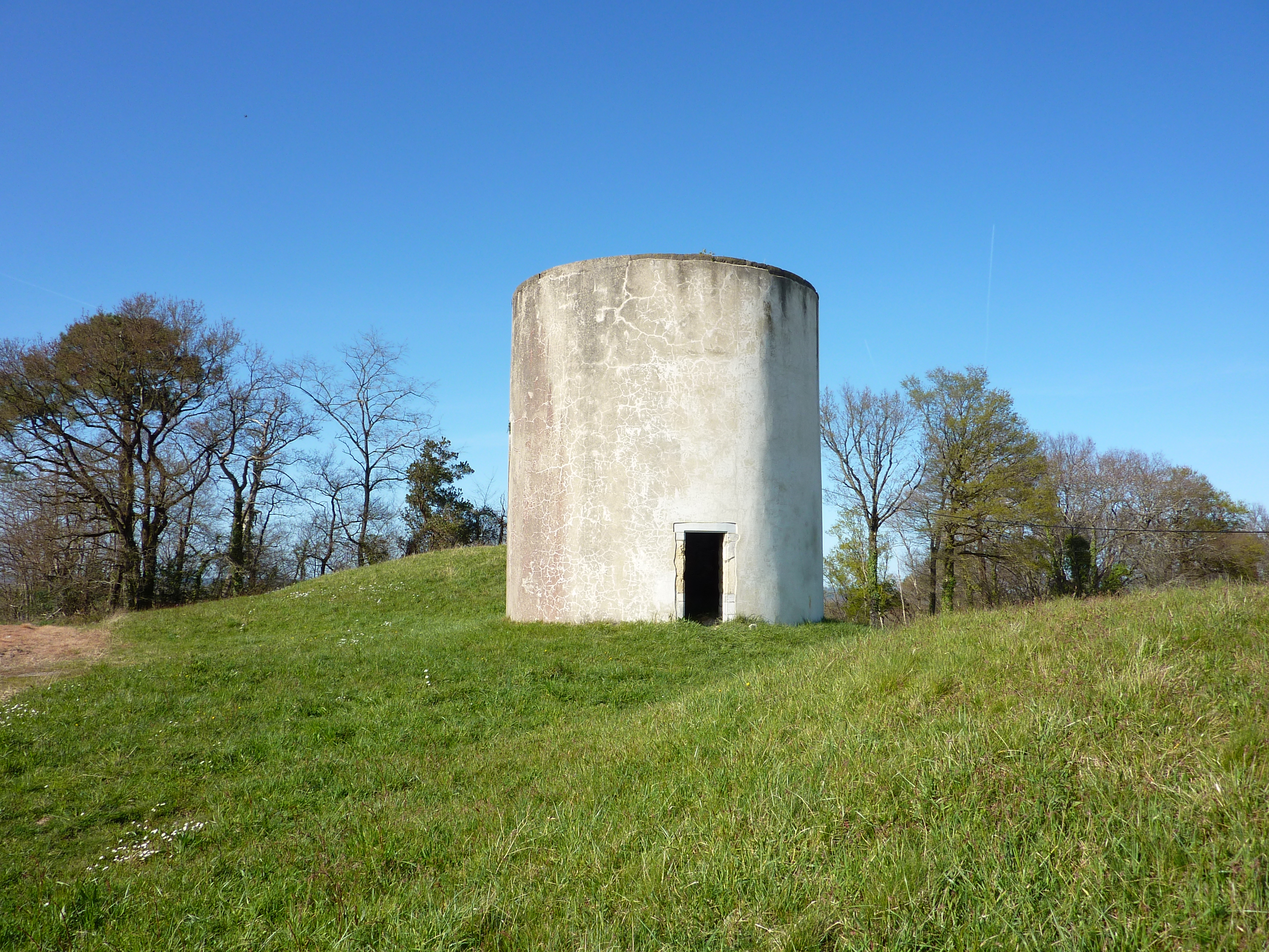 Ruines de moulin à vent de Bénesse Les Dax, point culminant du village